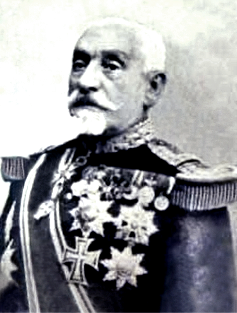 General Eracle Arion (Rumänien) um 1900